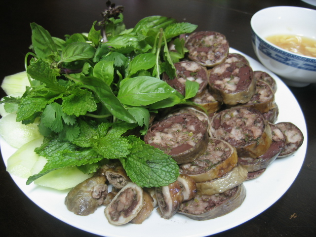 Dồi rán (tiết lợn bóp lẫn với thịt băm và mỡ tràng, bỏ thêm hành răm nhồi vào ruột già, luộc chín rồi rán).